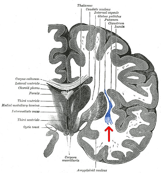 claustrum